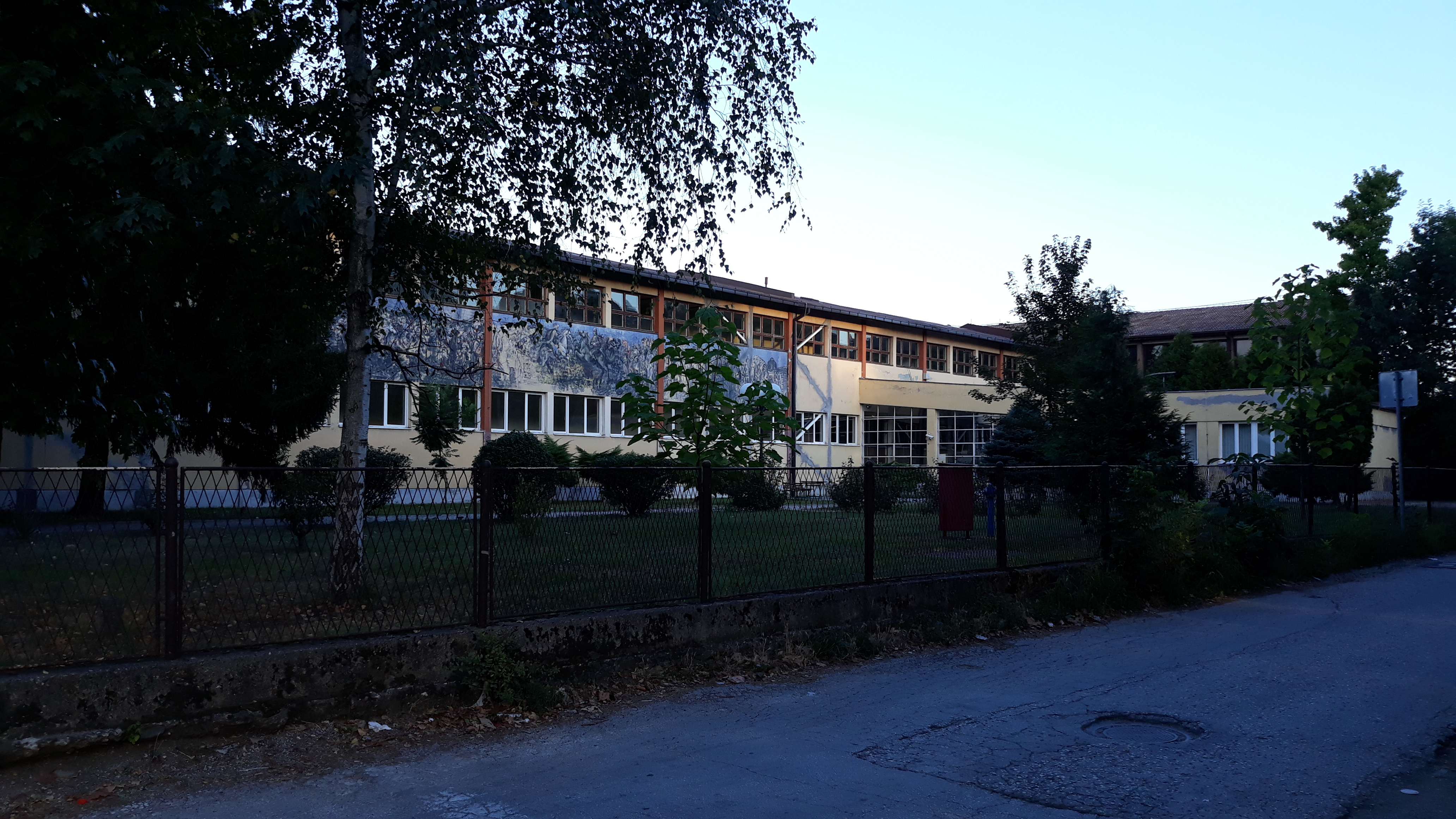 Основна школа „Јово Курсула“ налази се у Доситејевој улици у Краљеву.